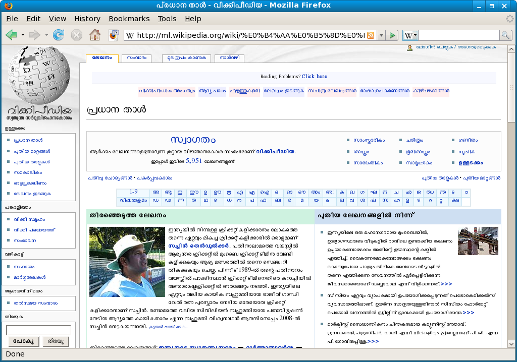 പ്രധാന താൾ - വിക്കിപീഡിയ - Mozilla Firefox